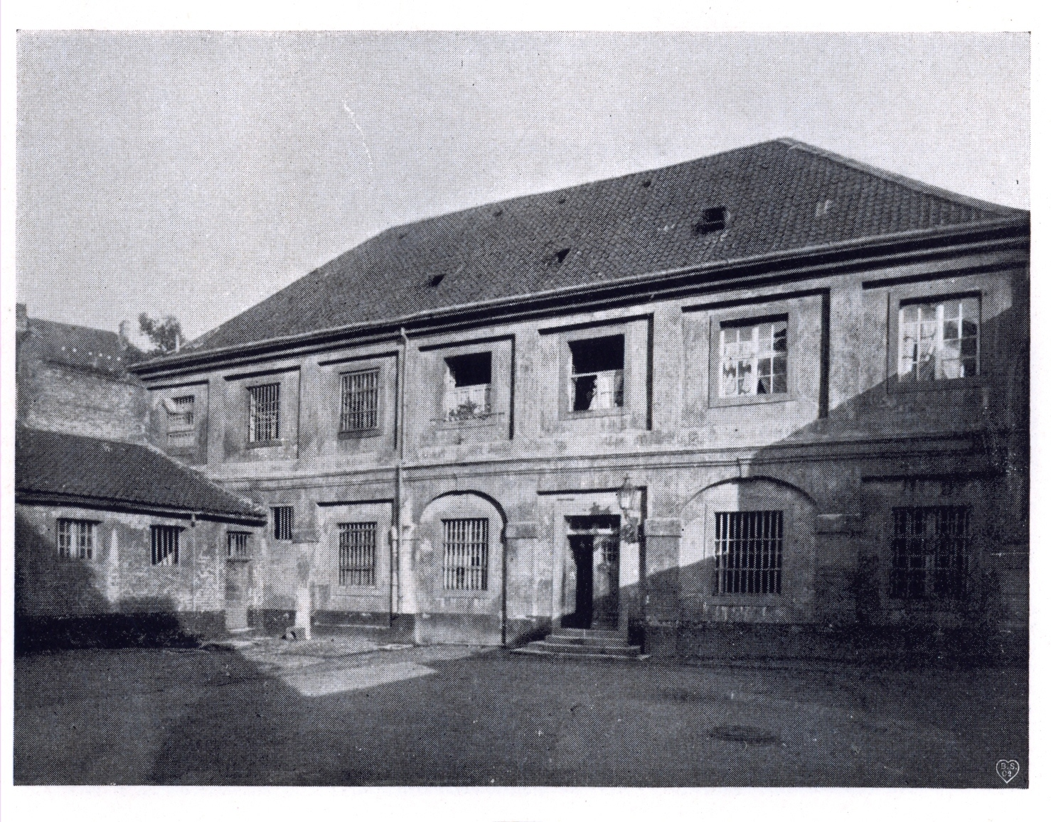 Dort 1780 errichtetes Stadtgefängnis "Königliche Arrest- und Corrections-Anstalt" Zugang in der Schulstraße 2a, Düsseldorf (auf einer historischen Aufnahme), im Düsseldorfer Platt allgemein „et Kaschott“ genannt, von Pastor Jääsch (Friedrich Gerst) ironisch auch als „Strafhotel“ bezeichnet. Standort der alten Akademie